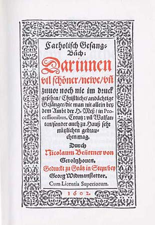 Nikolaus Beuttner: Catholisch Gesang-Buch. Printed by Georg Widmannstetter, Graz 1602 (title page)